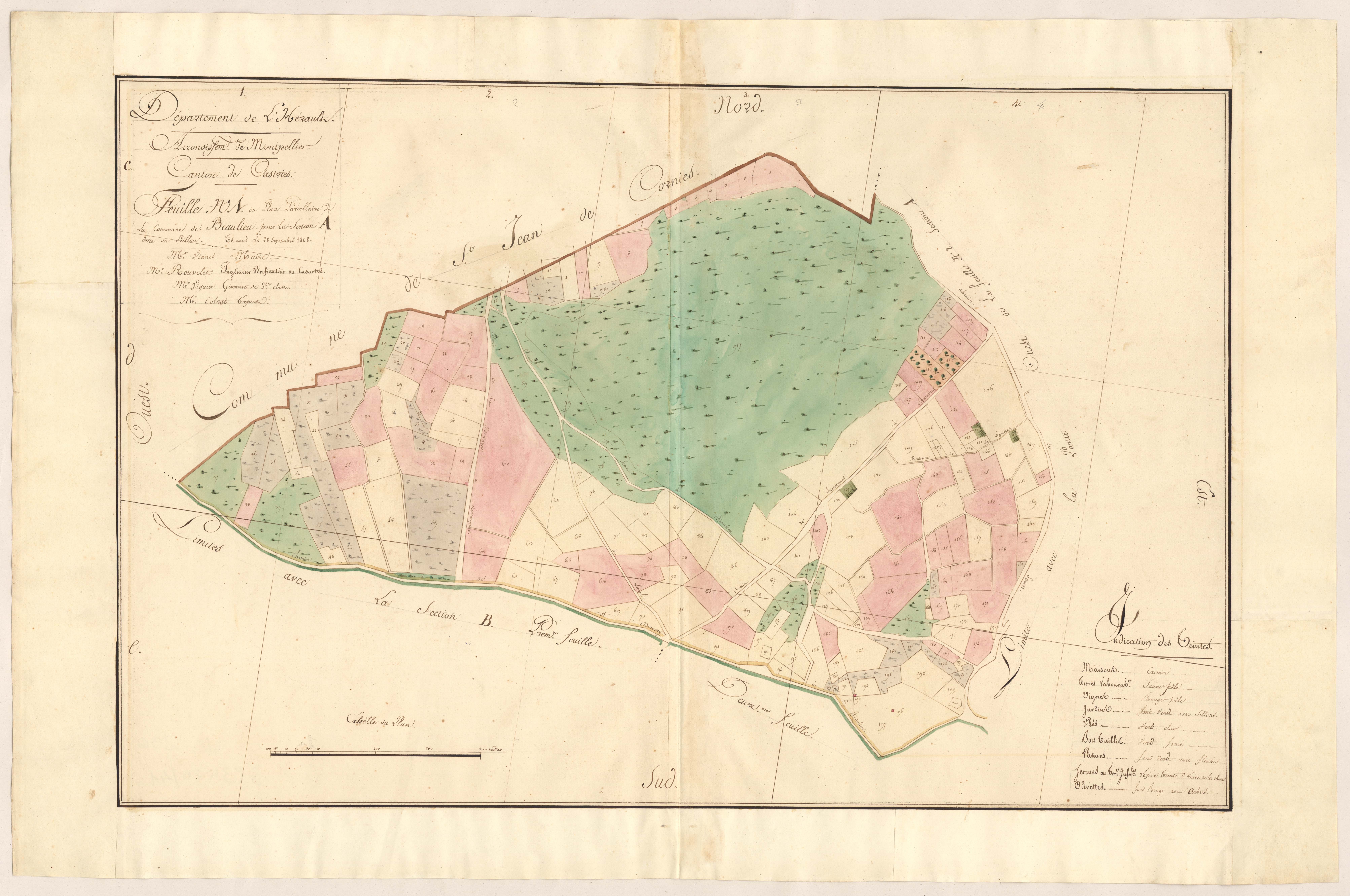 Beaulieu. - Cadastre napoléonien : section A1 de Peillou